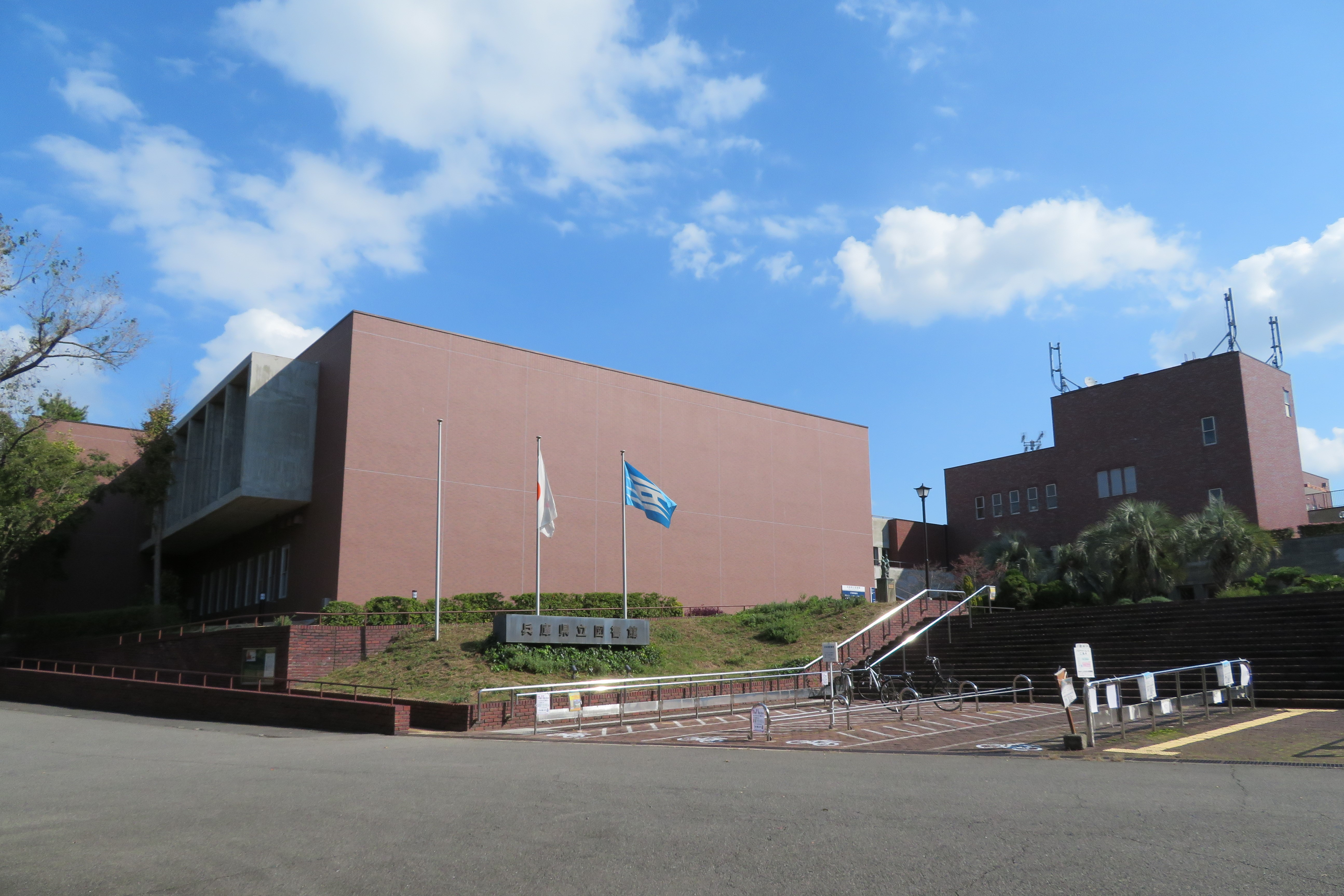 兵庫県立図書館